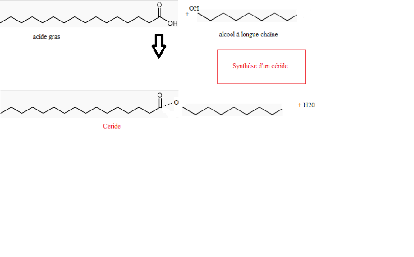 Schéma de la synthèse d'un céride.